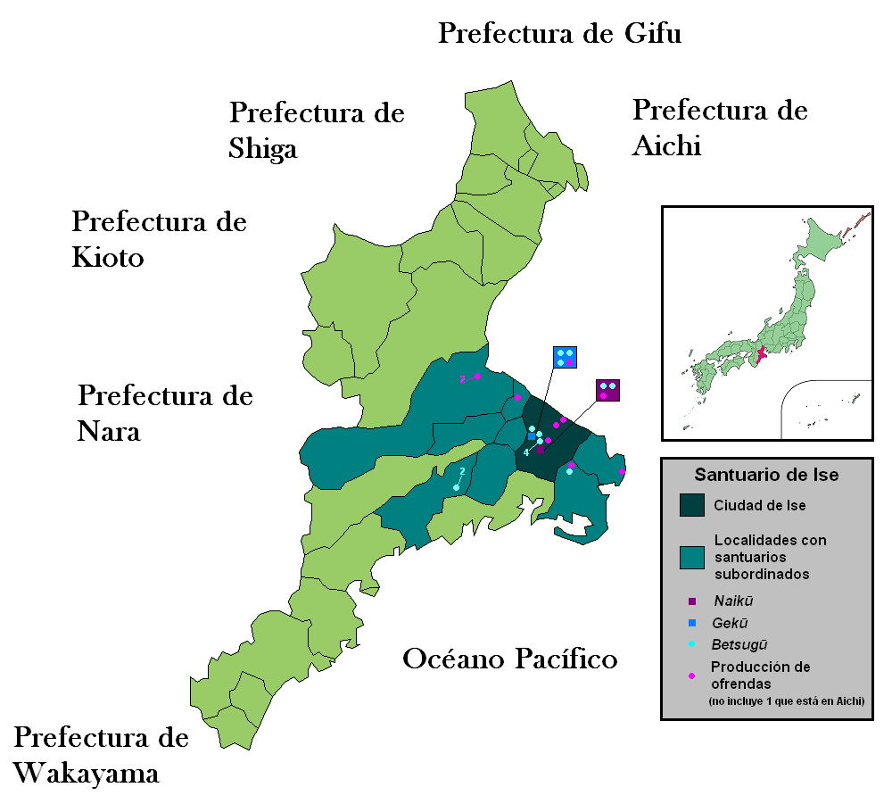 Mapa del Santuario de Ise en Japón. Map of Ise Shrine in Japan.